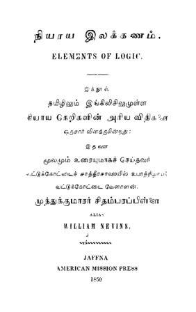 பகுப்பு:நூல் அட்டைகள்